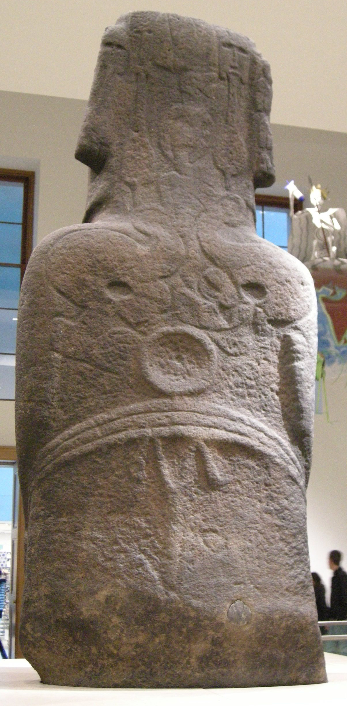 Hoa hanakai dall'isola di pasqua, retrom 1400 circa